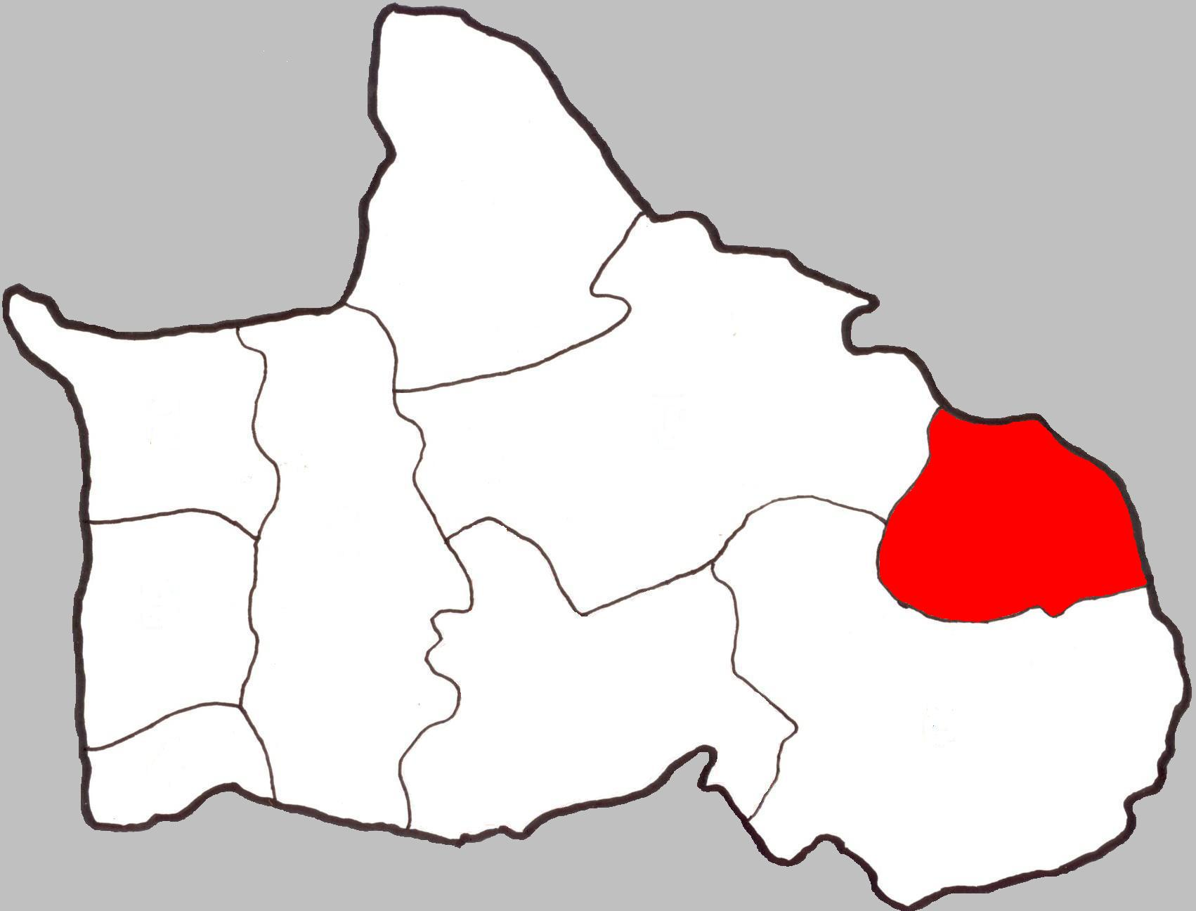 Map of Tambon Wat Ta Yom, Bang Krathum, Phitsanulok, Thailand